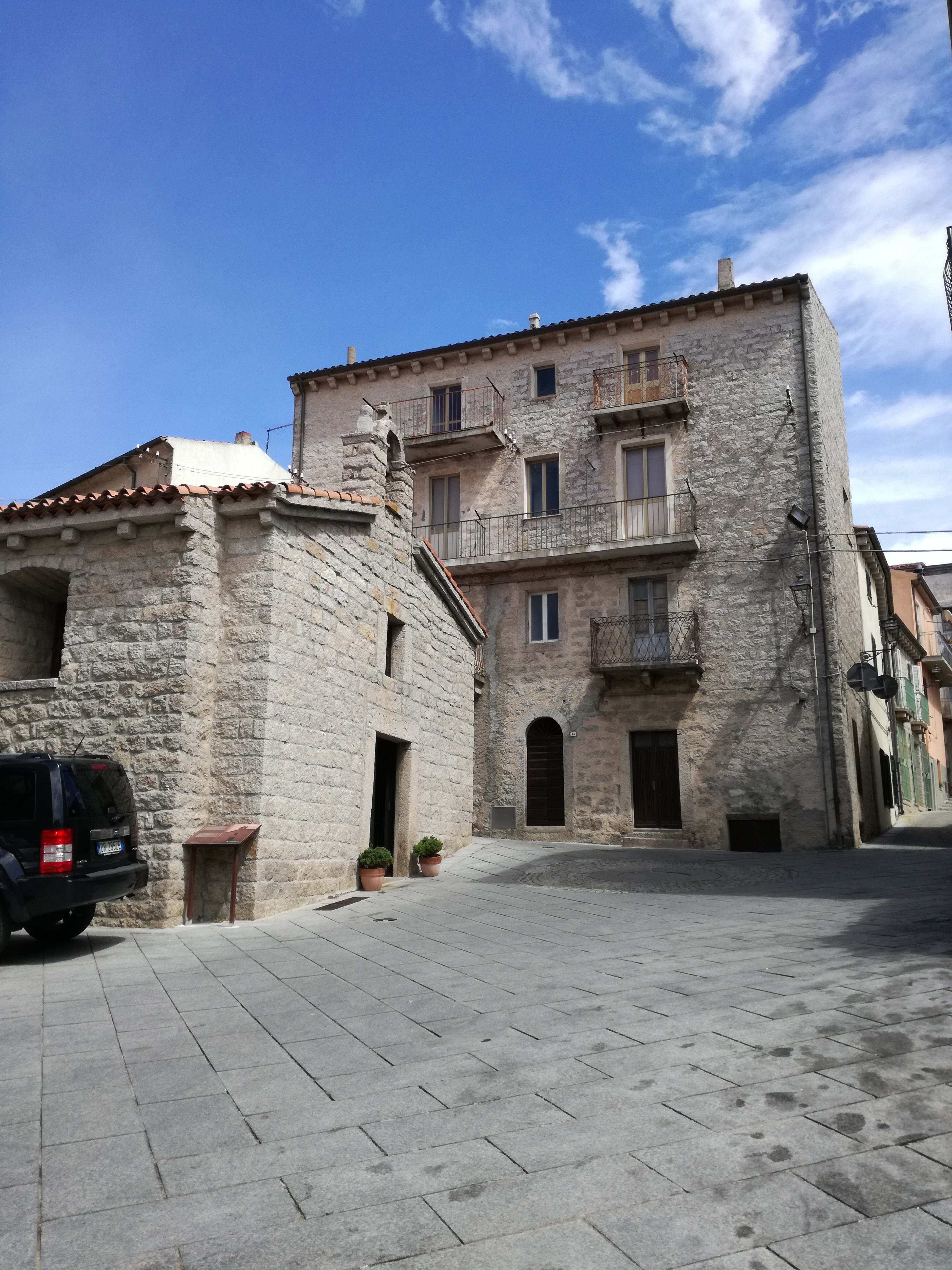 Piazza sant'Anna, rione Lu Caponi.